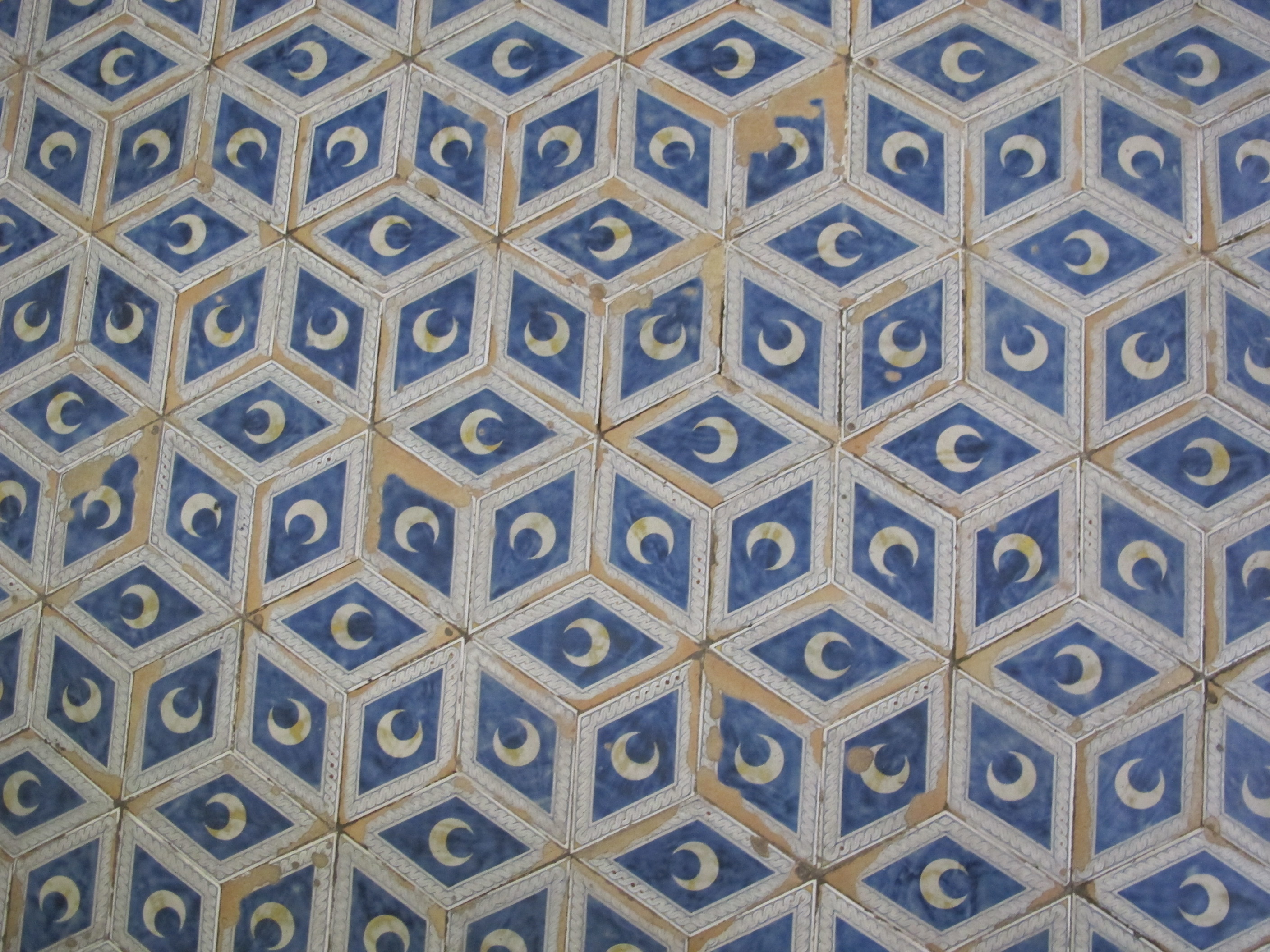 Libreria piccolomini, pavimento